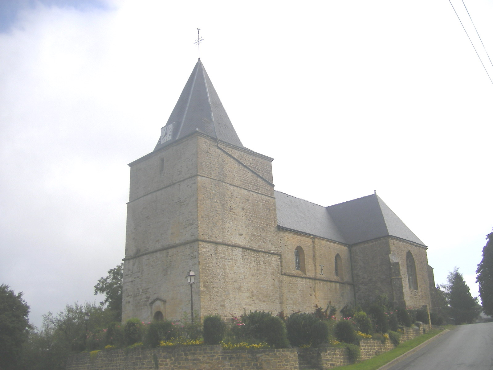 Église Saint-Martin de Remilly-les-Pothées (Ardennes, France) .